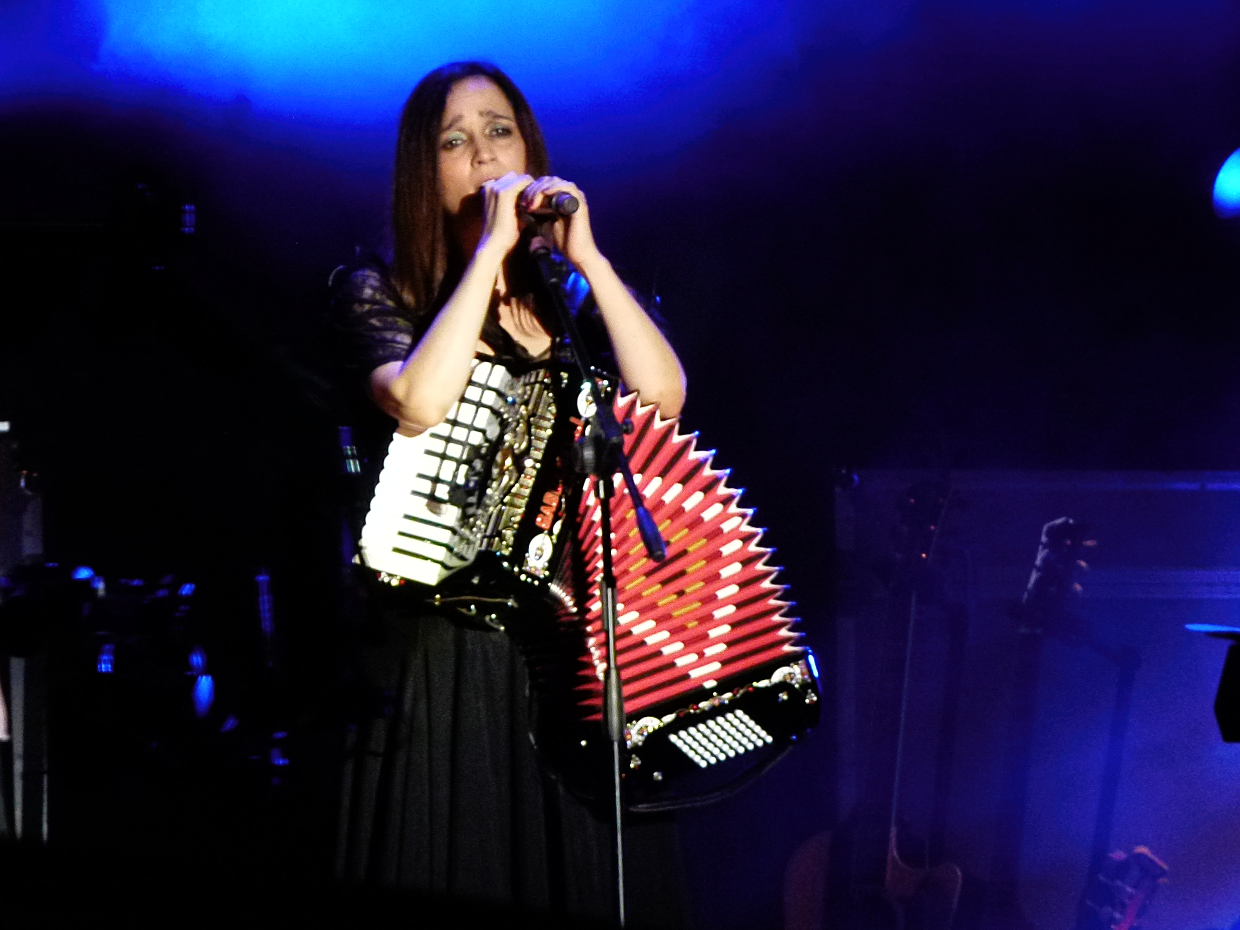 Presentación de Julieta Venegas sobre la avenida Corrientes (Buenos Aires) durante la Noche de las Librerías. (15 de diciembre 2012)